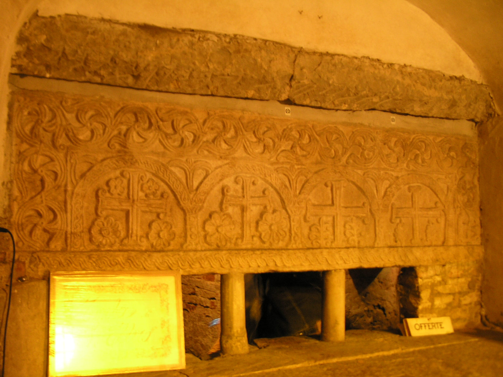 Sarcofago di Sant'Ellero, patrono di Galeata, di gusto ravennate bizantino, in marmo greco scolpito a croci, foglie e fiori, e databile all'VIII secolo.